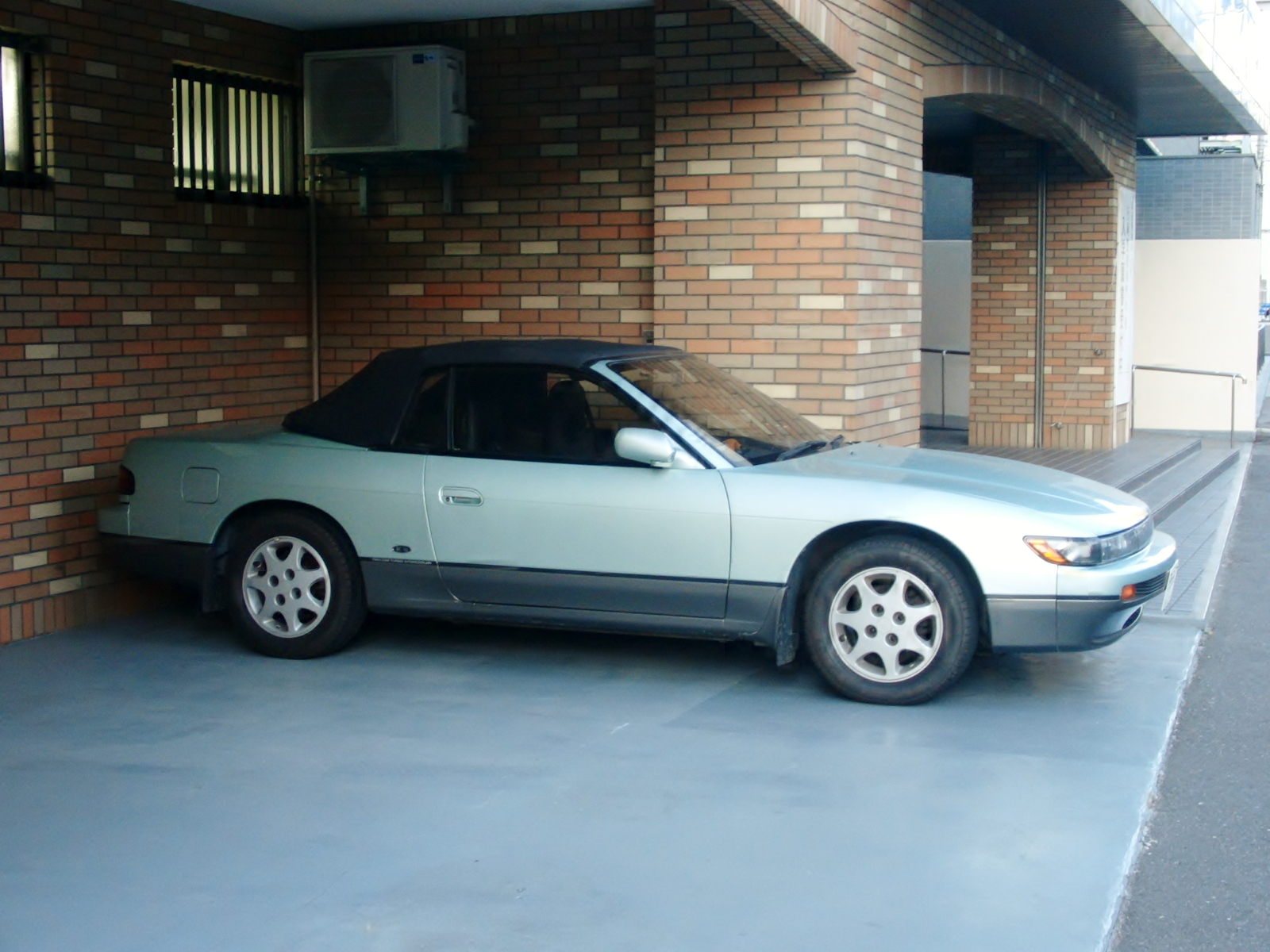 S13シルビアコンバーチブルを撮影。勘違いで一度差し戻してしまった後にその勘違いに気付き再び戻してます。すみません。